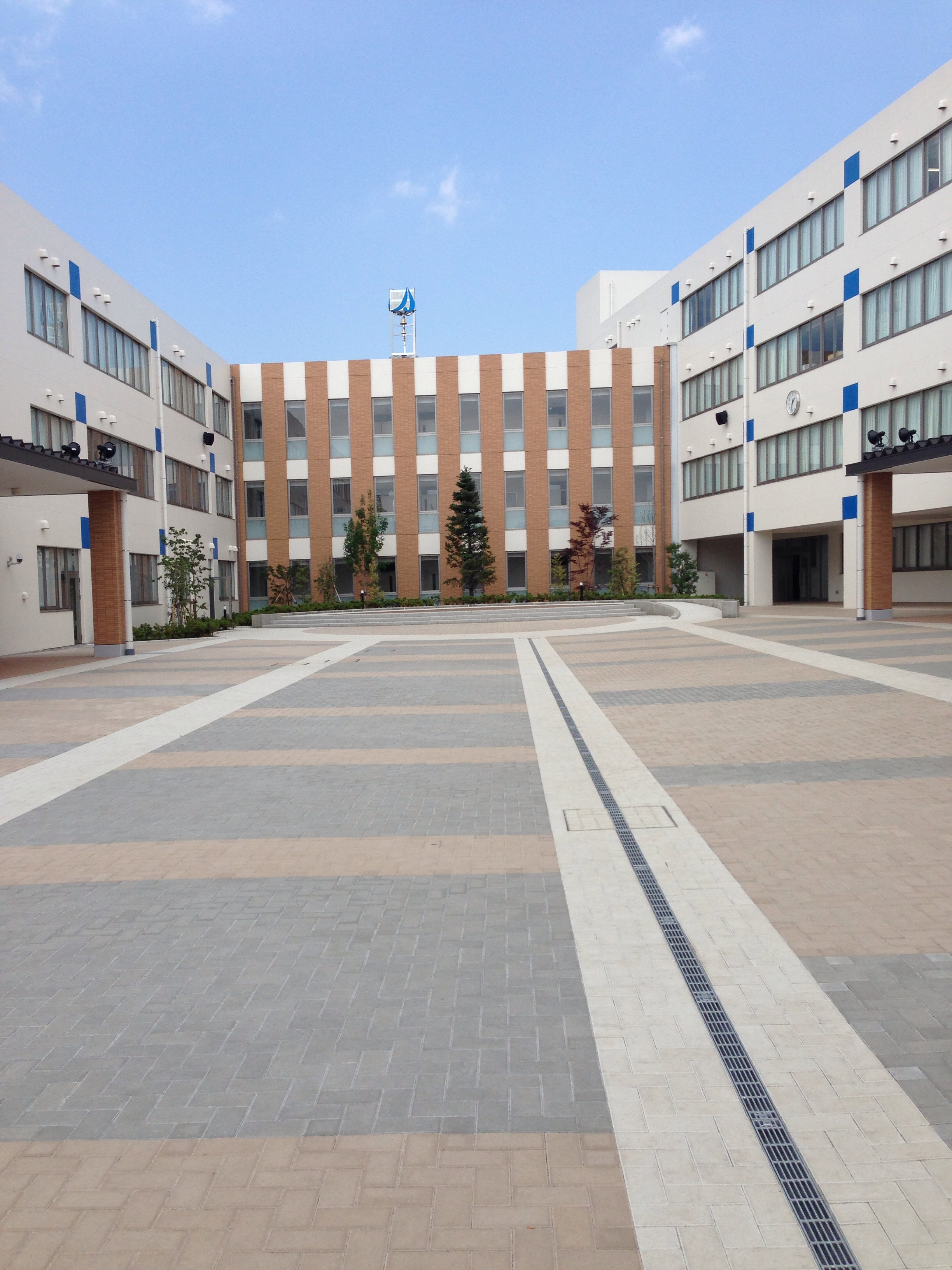 湘南学院高校正門付近からの写真